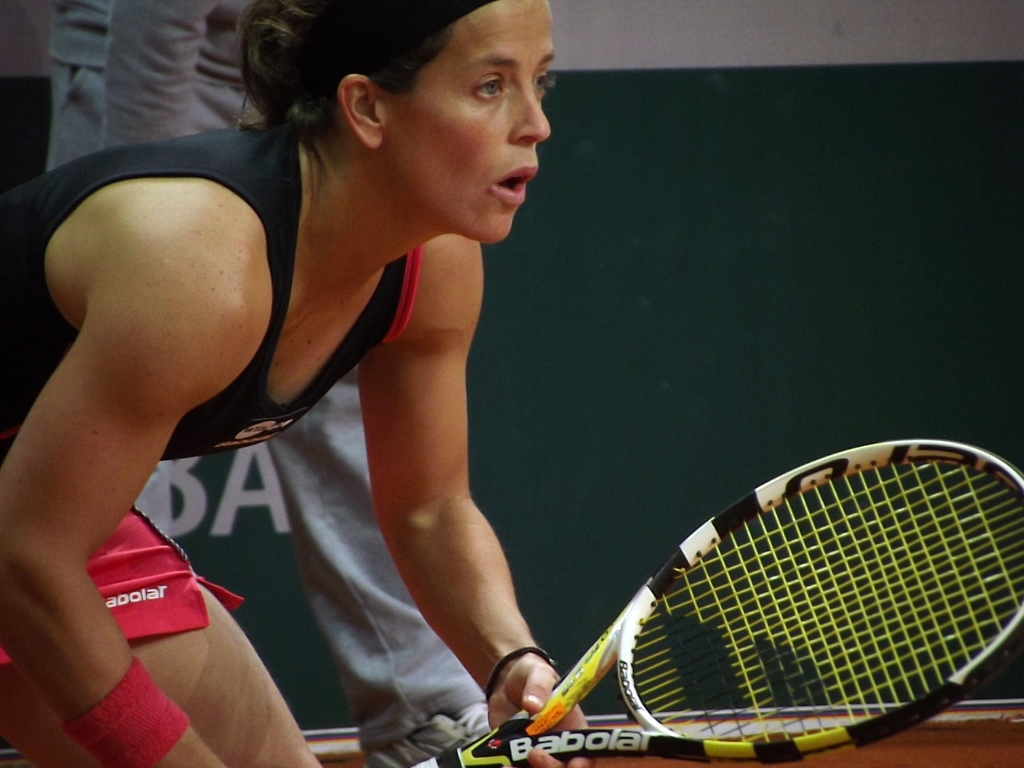 Zdjęcie zrobione podczas kobiecego turnieju tenisowego BNP Paribas Katowice Open, w katowickim Spodku.